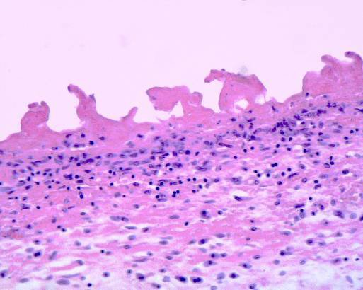 Pericarditis fibrinosa